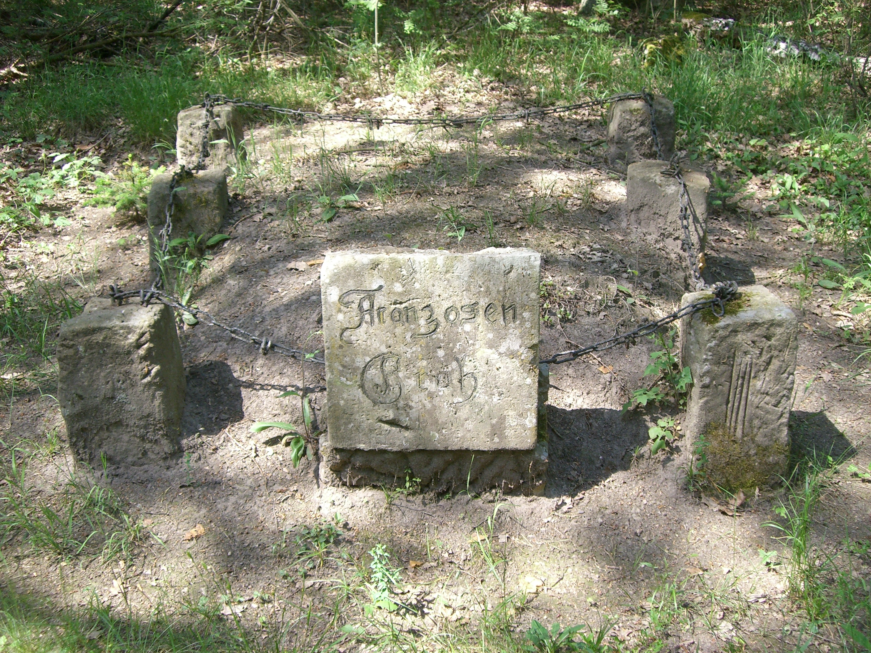 Das Franzosen-Grab in der Annaburger Heide – an der Straße von Zwethau (Sachsen) nach Züllsdorf (Brandenburg)